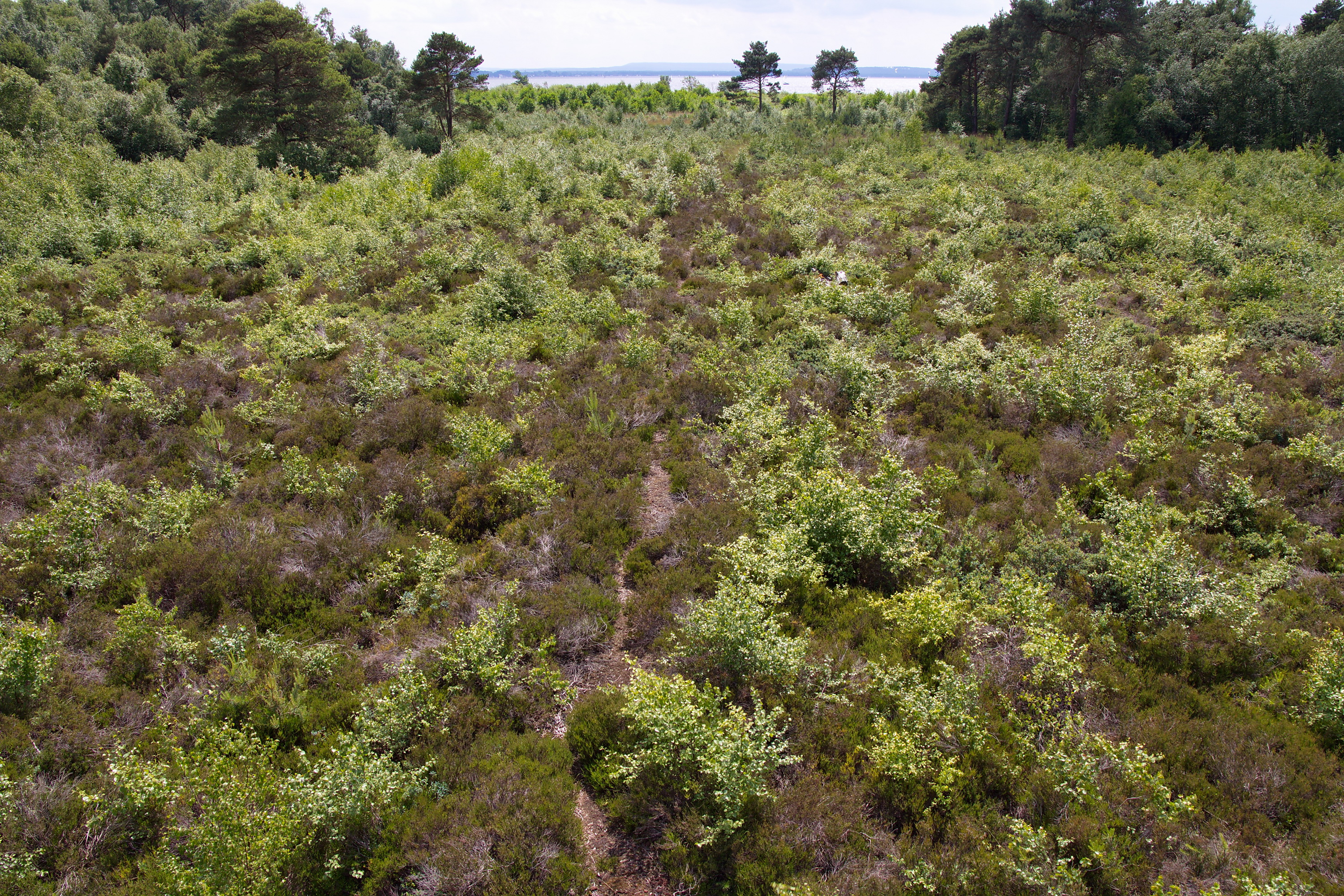 Totes Moor am Ostufer des Steinhuder Meeres (Neustadt am Rübenberge), Niedersachsen, Deutschland.